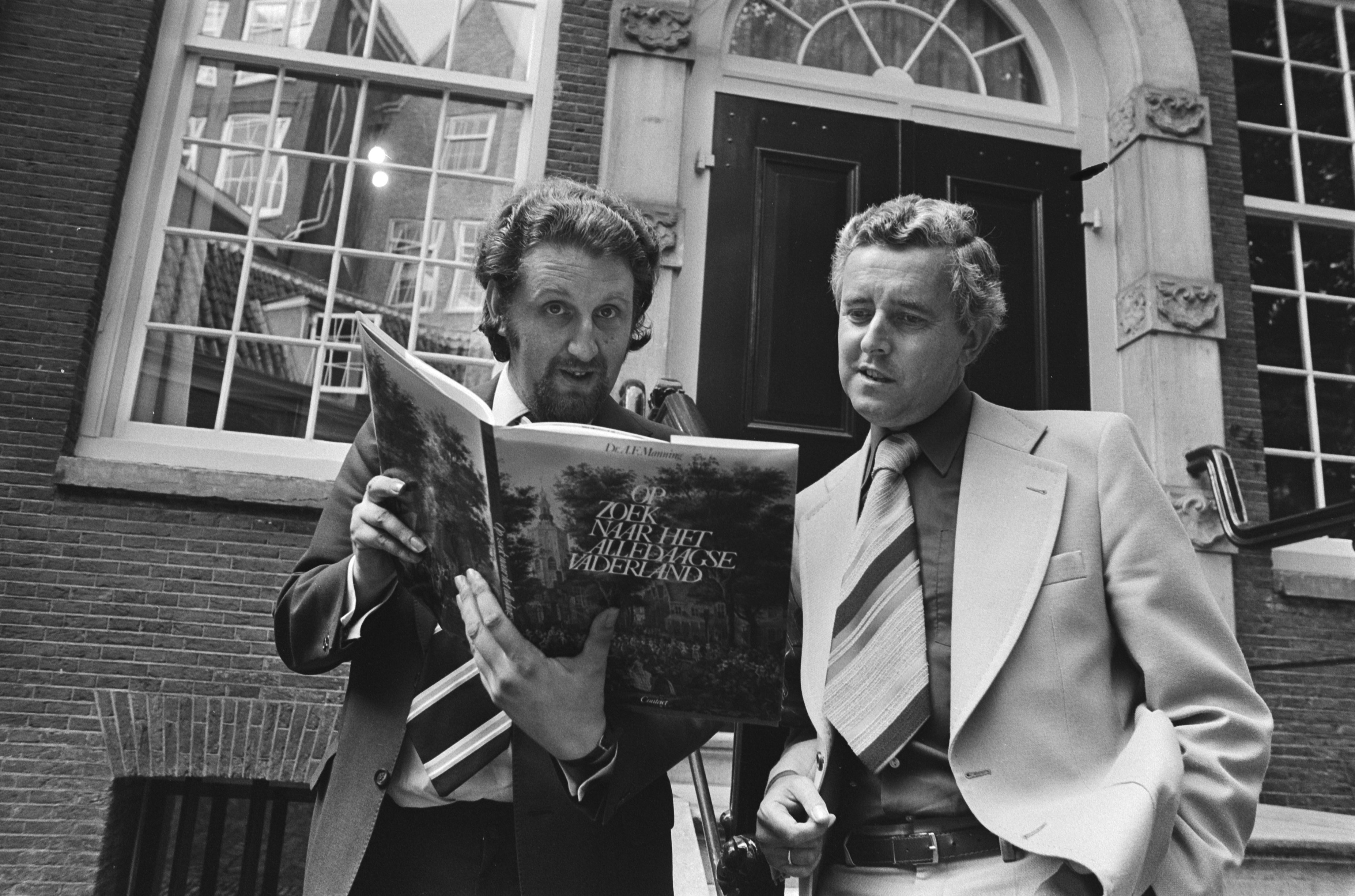 Collectie / Archief : Fotocollectie Anefo Reportage / Serie : De presentatie van het boek van de maand: "Op zoek naar het alledaagse vaderland" Beschrijving : De schrijver prof. dr. Manning (r) en de illustrator drs. Lemmens Datum : 25 augustus 1975 Trefwoorden : boeken, grafisch kunstenaars, schrijvers Persoonsnaam : Lemmens, G. Th. M., Manning, A.F. Fotograaf : Fotograaf Onbekend / Anefo Auteursrechthebbende : Nationaal Archief Materiaalsoort : Negatief (zwart/wit) Nummer archiefinventaris : bekijk toegang 2.24.01.05 Bestanddeelnummer : 928-1207